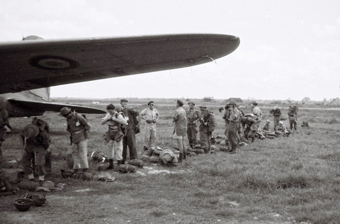 Éléments du 1er bataillon parachutiste de choc sous l'aile d'un Dakota Collection Laurent Jourquin - Autorisation de publier la photographie via le site (Cf.